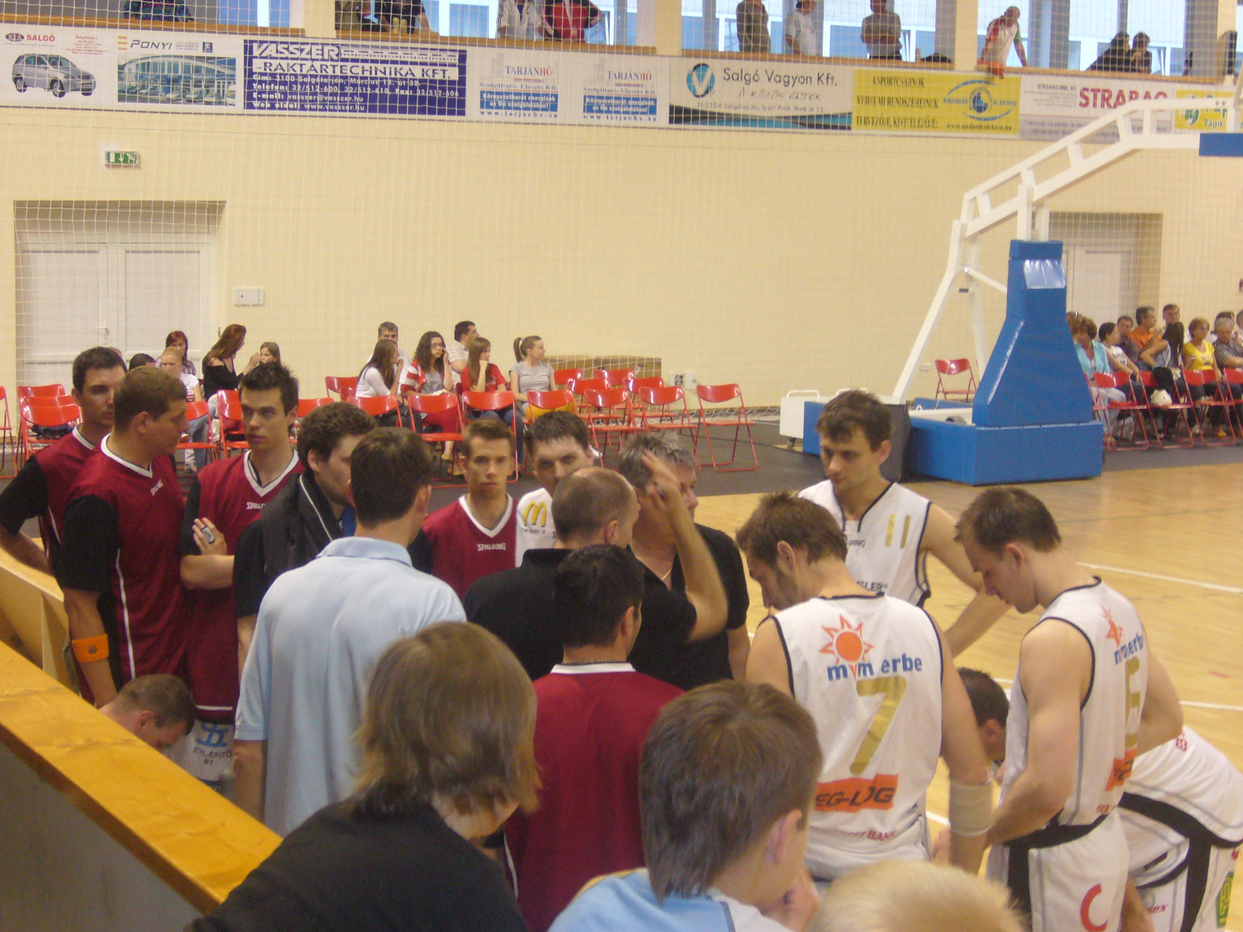 A Salgótarjáni KSE csapata időkérés közben